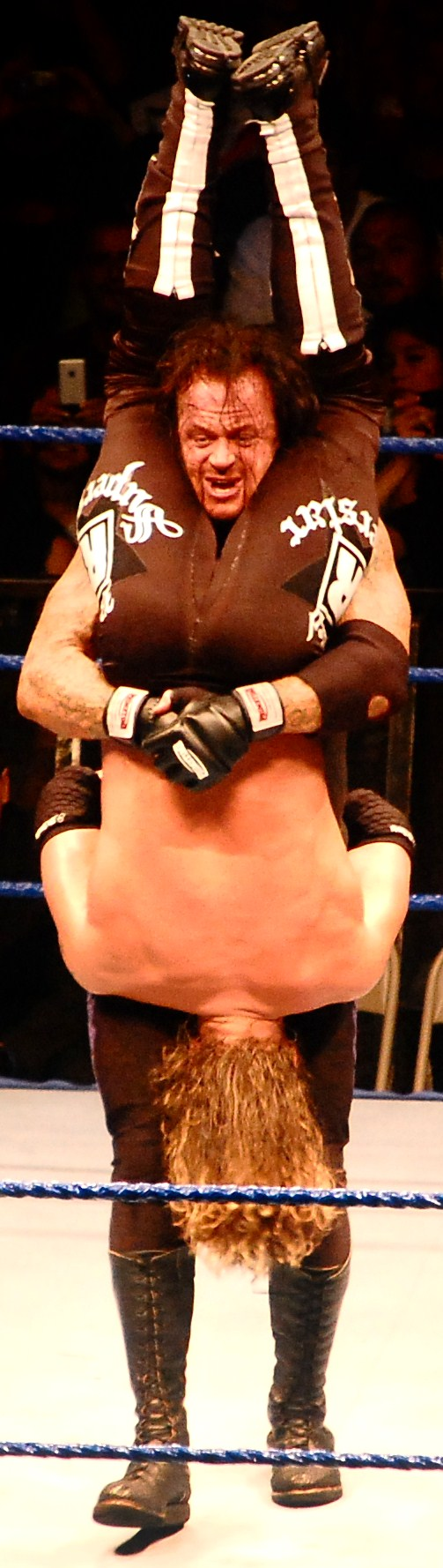 notable undertaker frente a edge